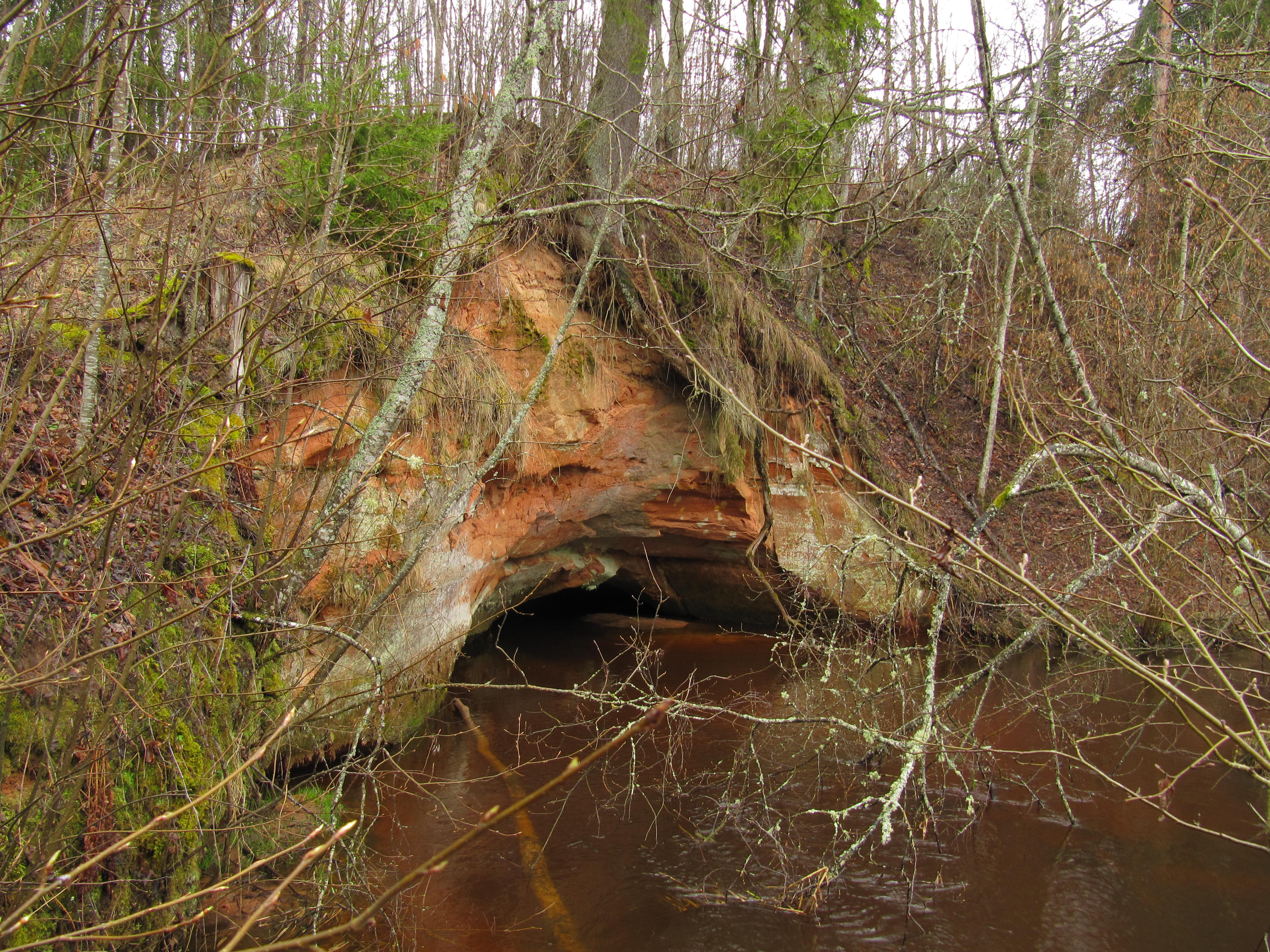 Lopa paljand